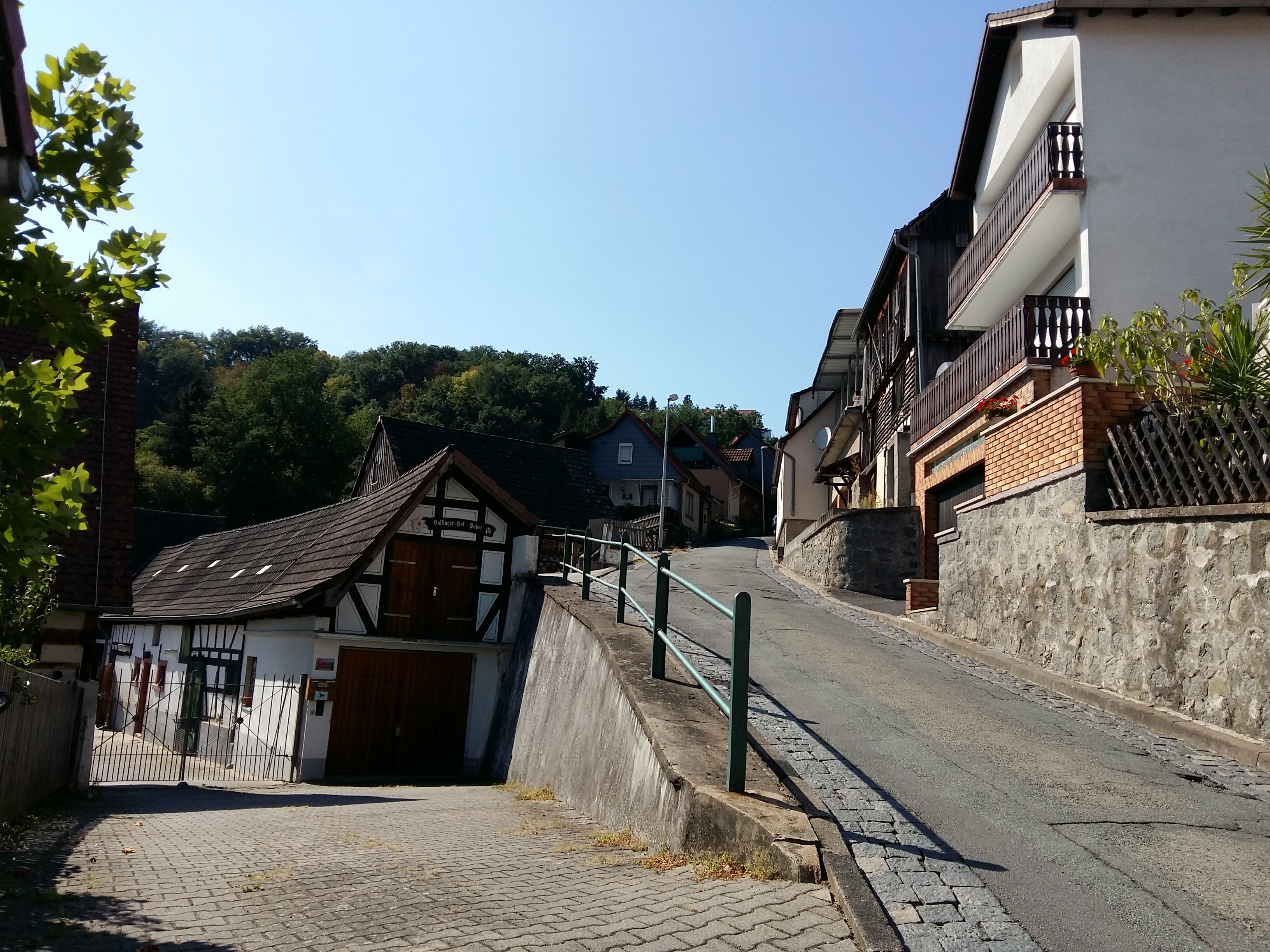 Blick durch die Lichtenberger Straße (höhe 21/28) nach Westen/Richtung Lichtenberg in Obernhausen, Fischbachtal